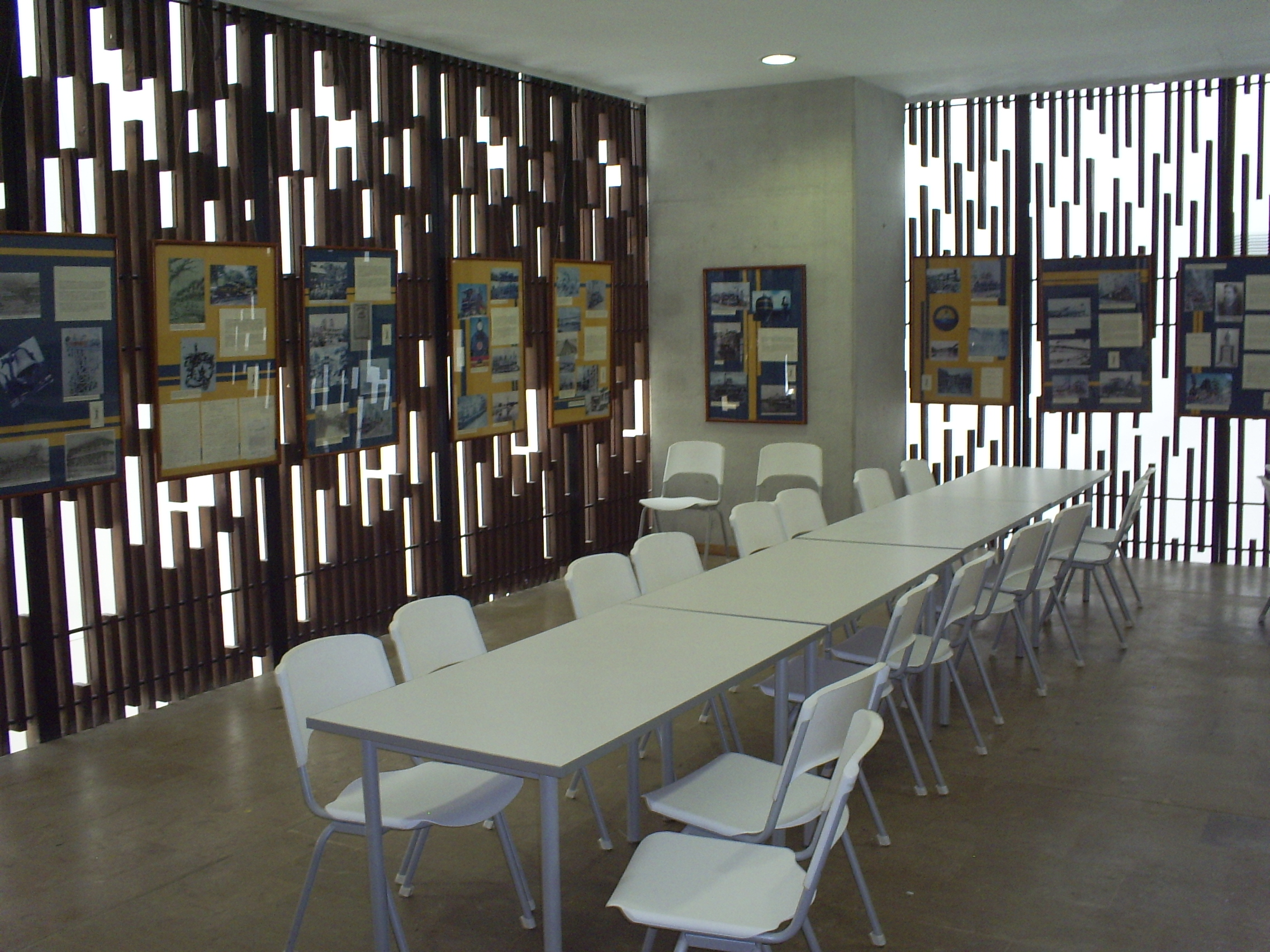 Biblioteca España, Medellín, Colombia